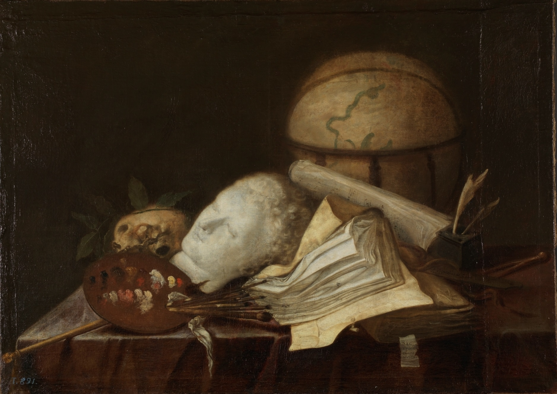 Las artes plásticas aparecen representadas por una paleta cargada de pinceles y una cabeza antigua, la música por una partitura, las letras por un tintero y varios libros, y la geografía por un globo terráqueo. El carácter de vánitas de la obra aparece subrayado por la presencia de una calavera coronada de laurel en la parte izquierda del lienzo, inequívoco símbolo del triunfo de la muerte y de la vanidad de los logros terrenales. La simbología de la obra parece clara: la inutilidad de acumular saberes y fama ante la inexorabilidad de la muerte.